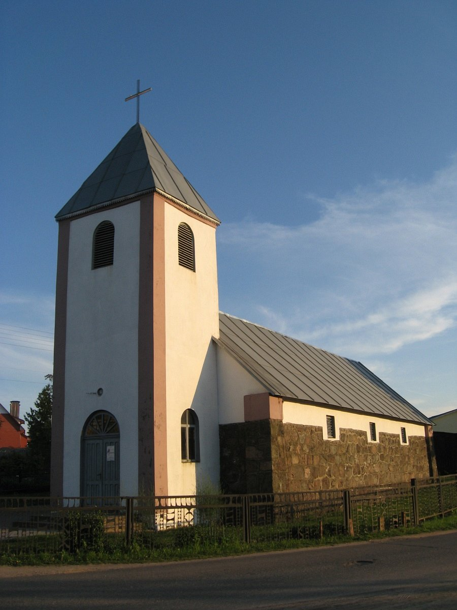 Гарадзея. Касцёл